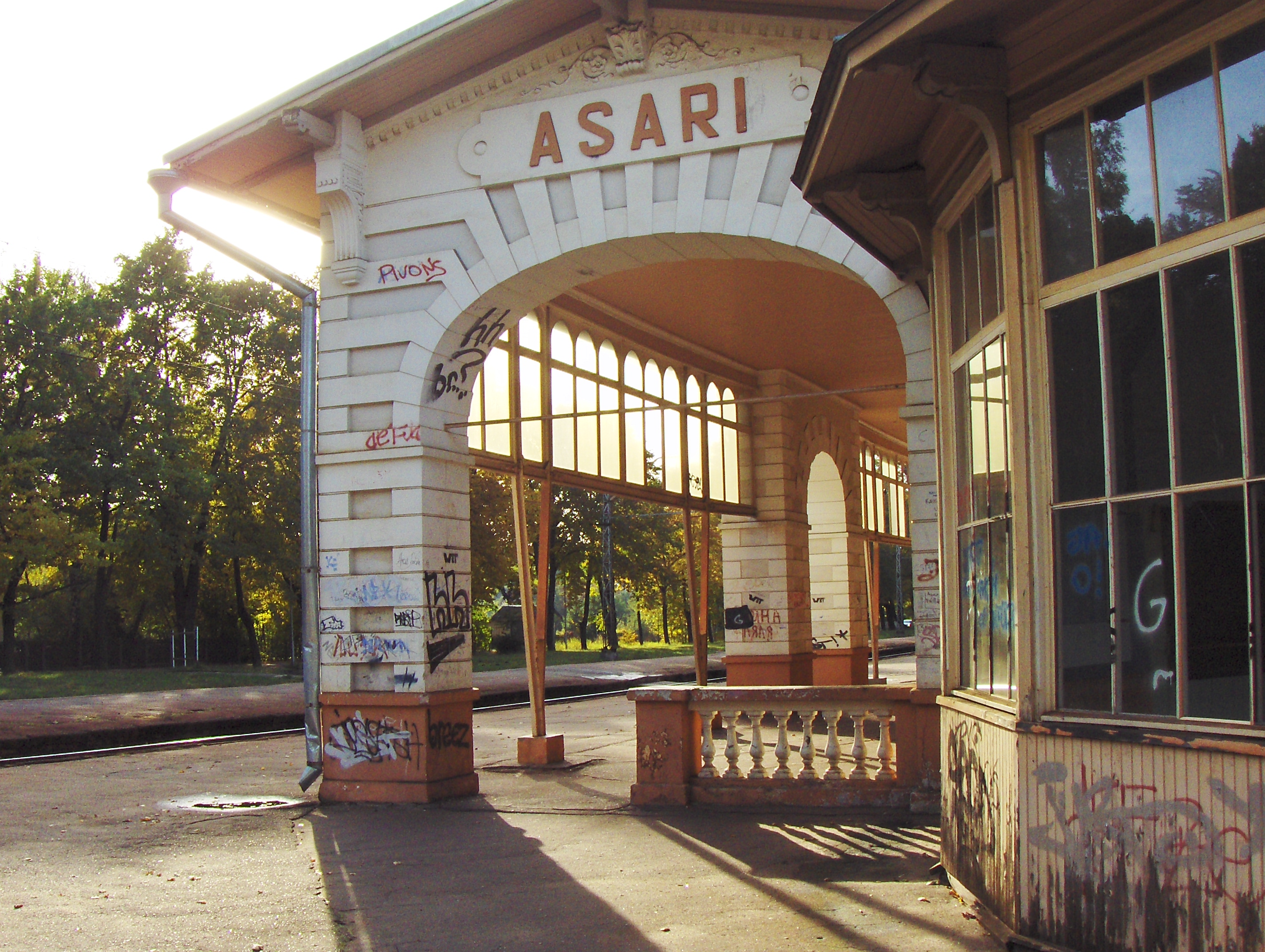 Asari